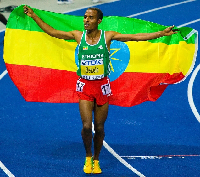 Mistr světa Kenenisa Bekele na čestném okruhu po běhu na 10 000 metrů.